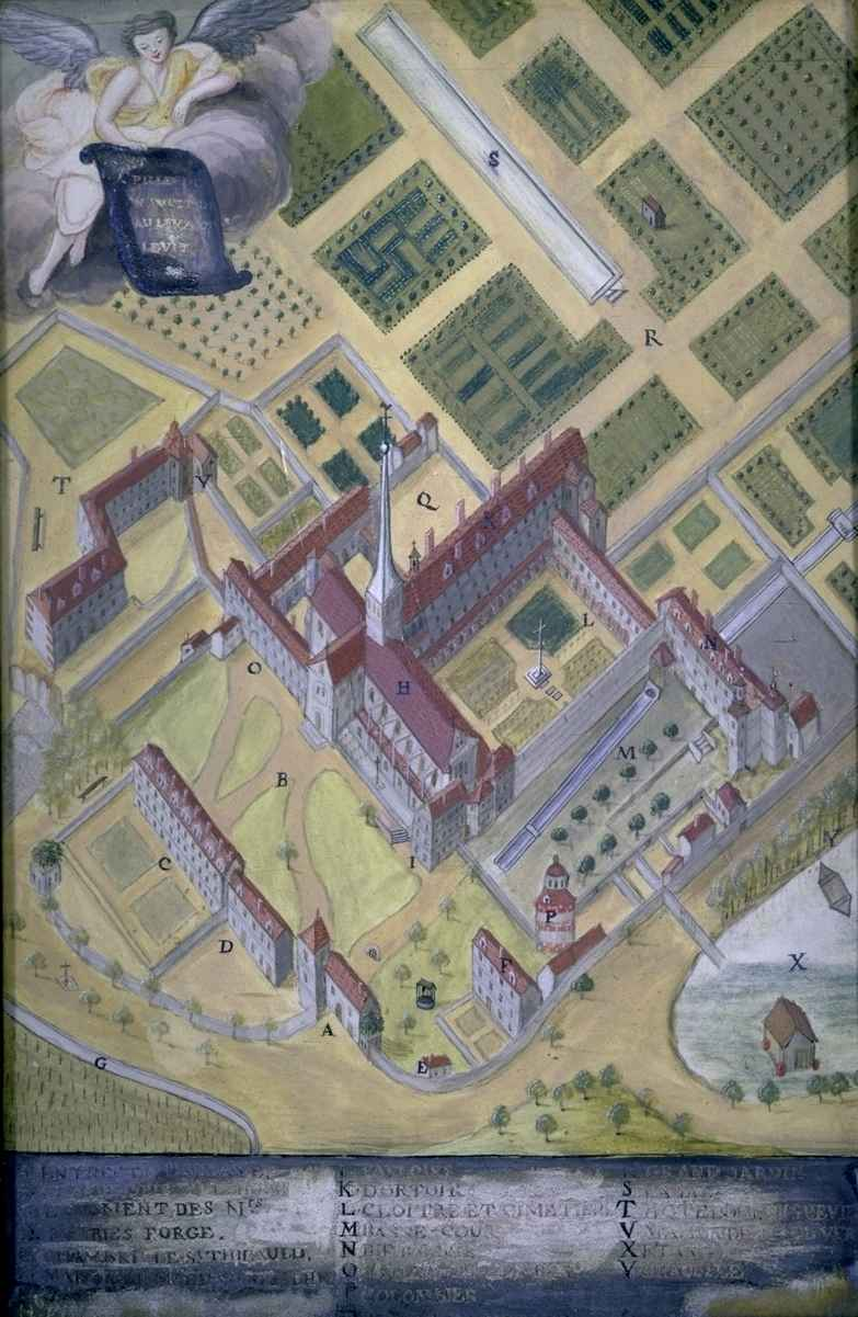 Plan du monastère de Port-Royal-des-Champs d'après une gravure de Magdeleine Hortemels